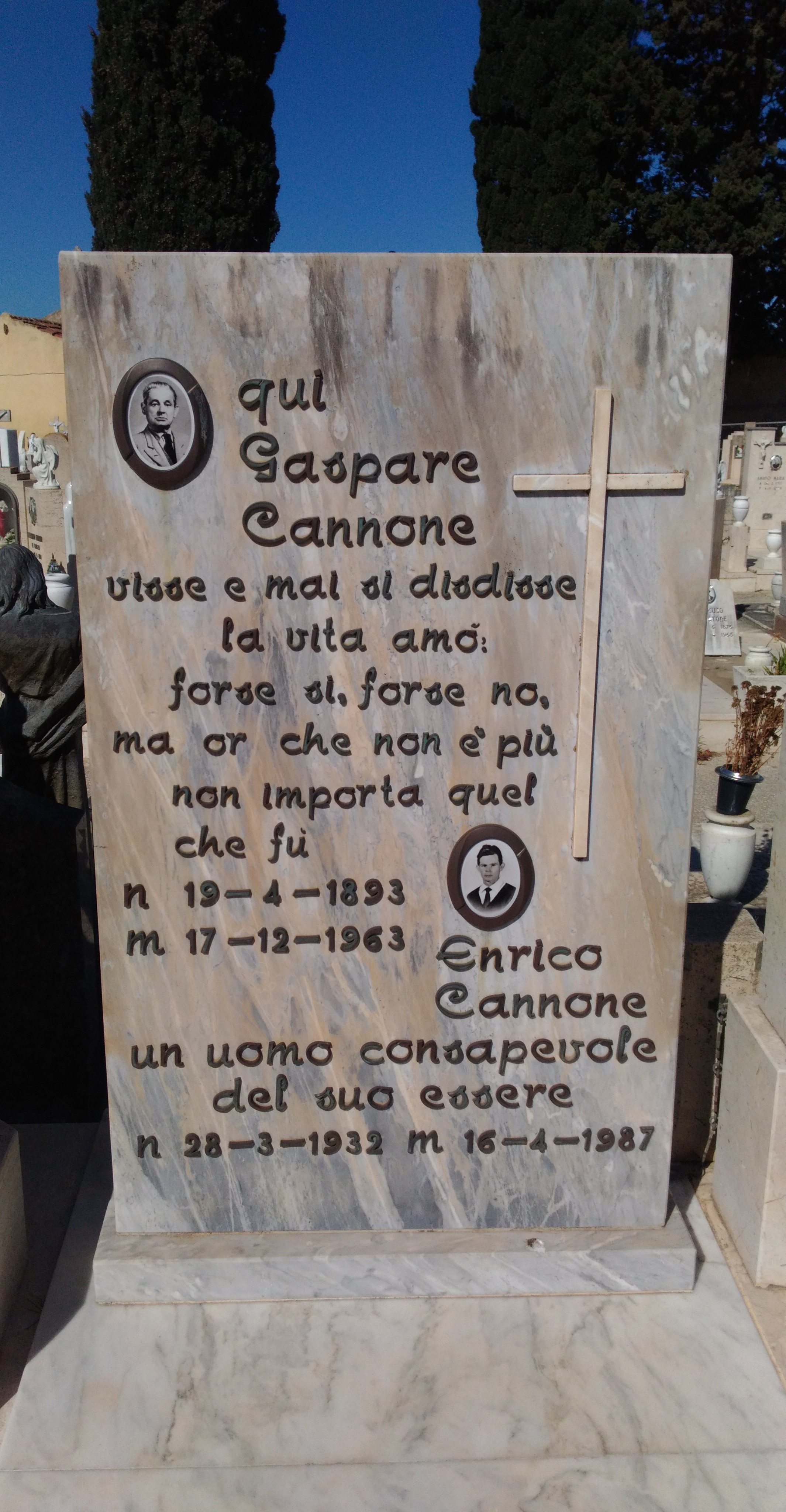 Monumento funebre di Gaspare Cannone e del figlio Enrico